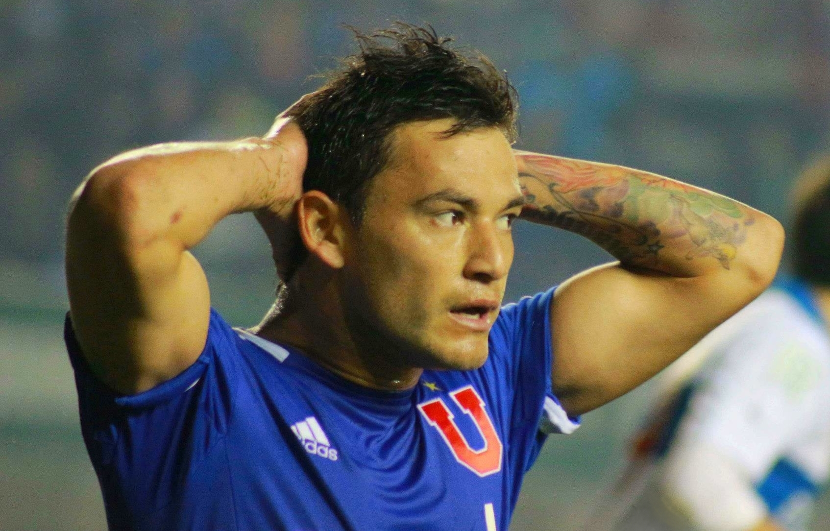 Mediocampista Chileno